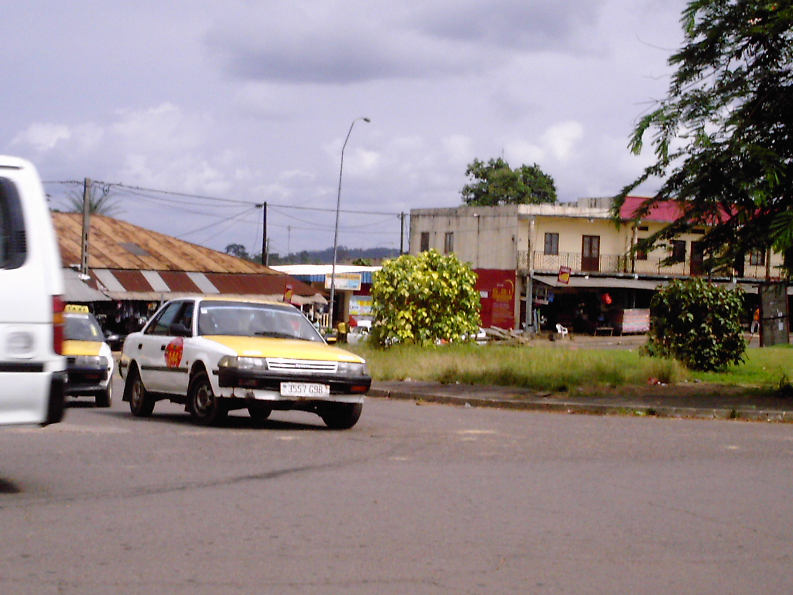 vue de la ville d'Oyem, au Gabon. Le taxi au premier plan porte les couleurs imposées dans cette ville : jaune et blanc